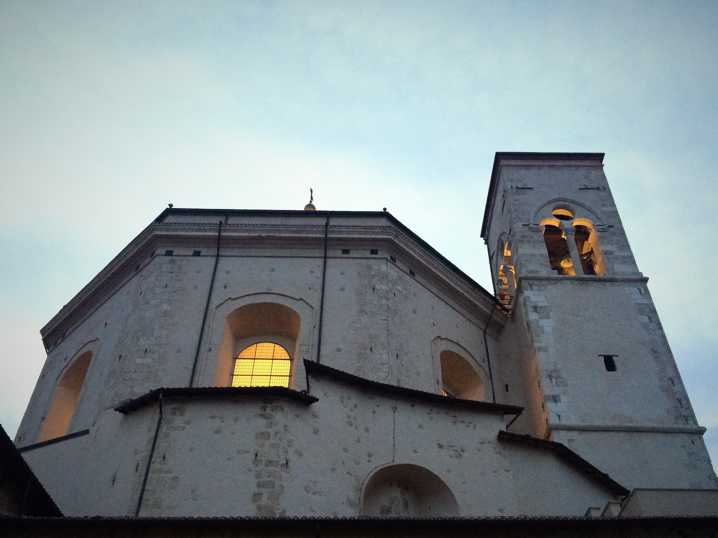 La cupola e il campanile di San Bernardino (L'Aquila) al tramonto.